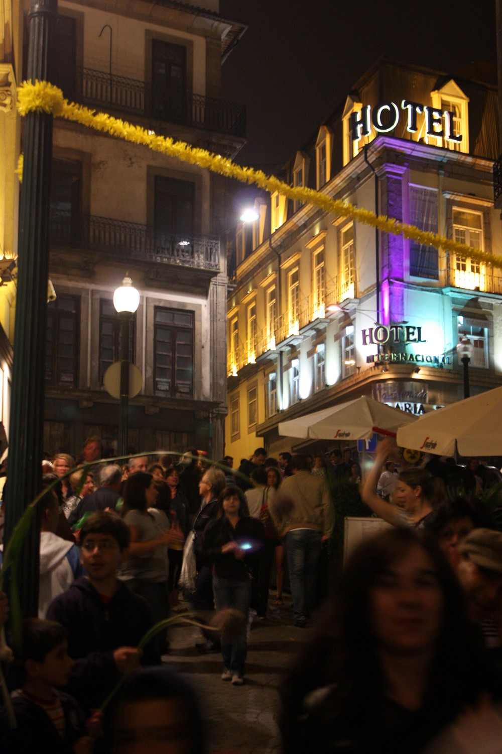 Noite de S. João (Rua da Fábrica)